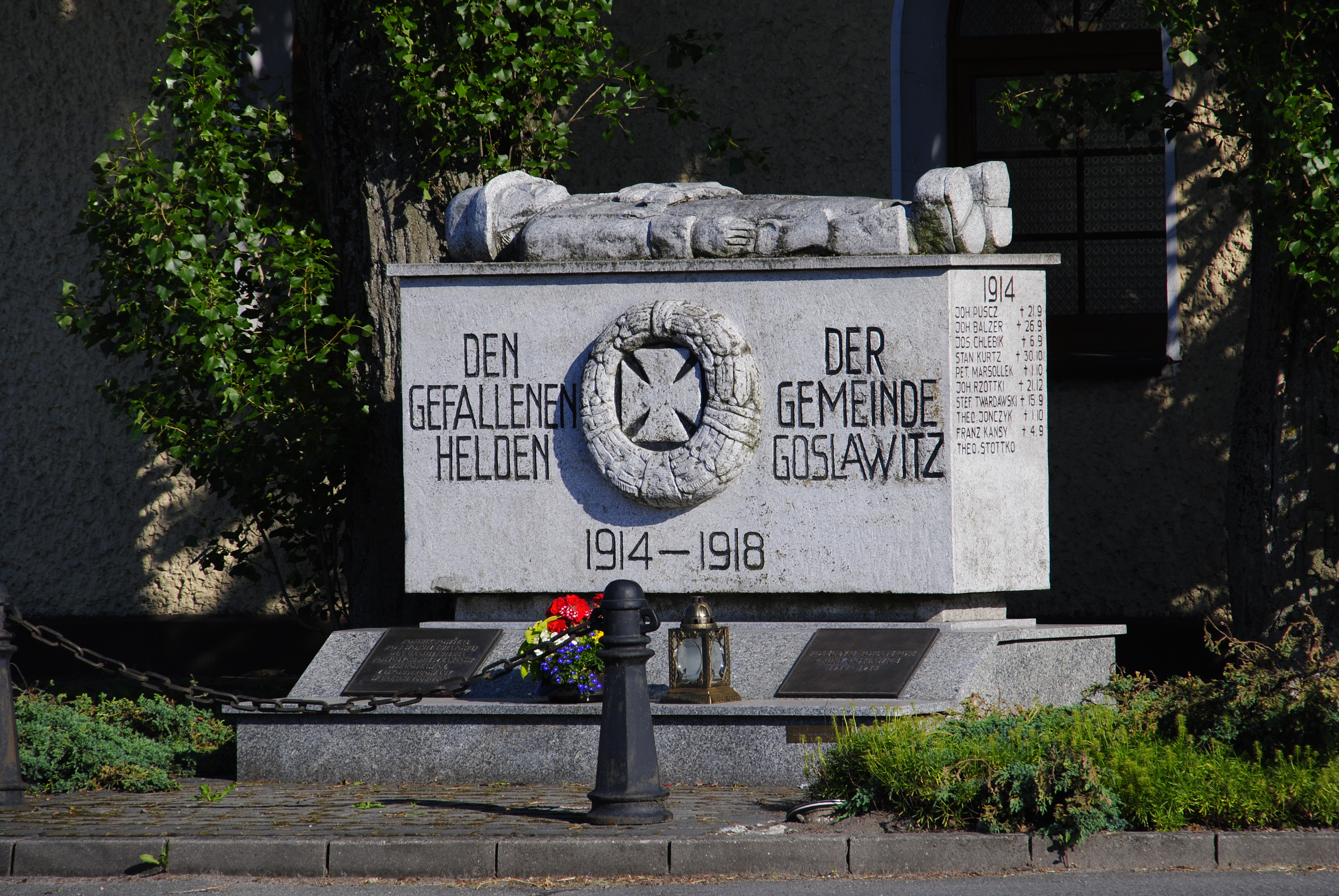 Denkmal für die Gefallenen des 1. Weltkrieges in Oppeln-Goslawitz